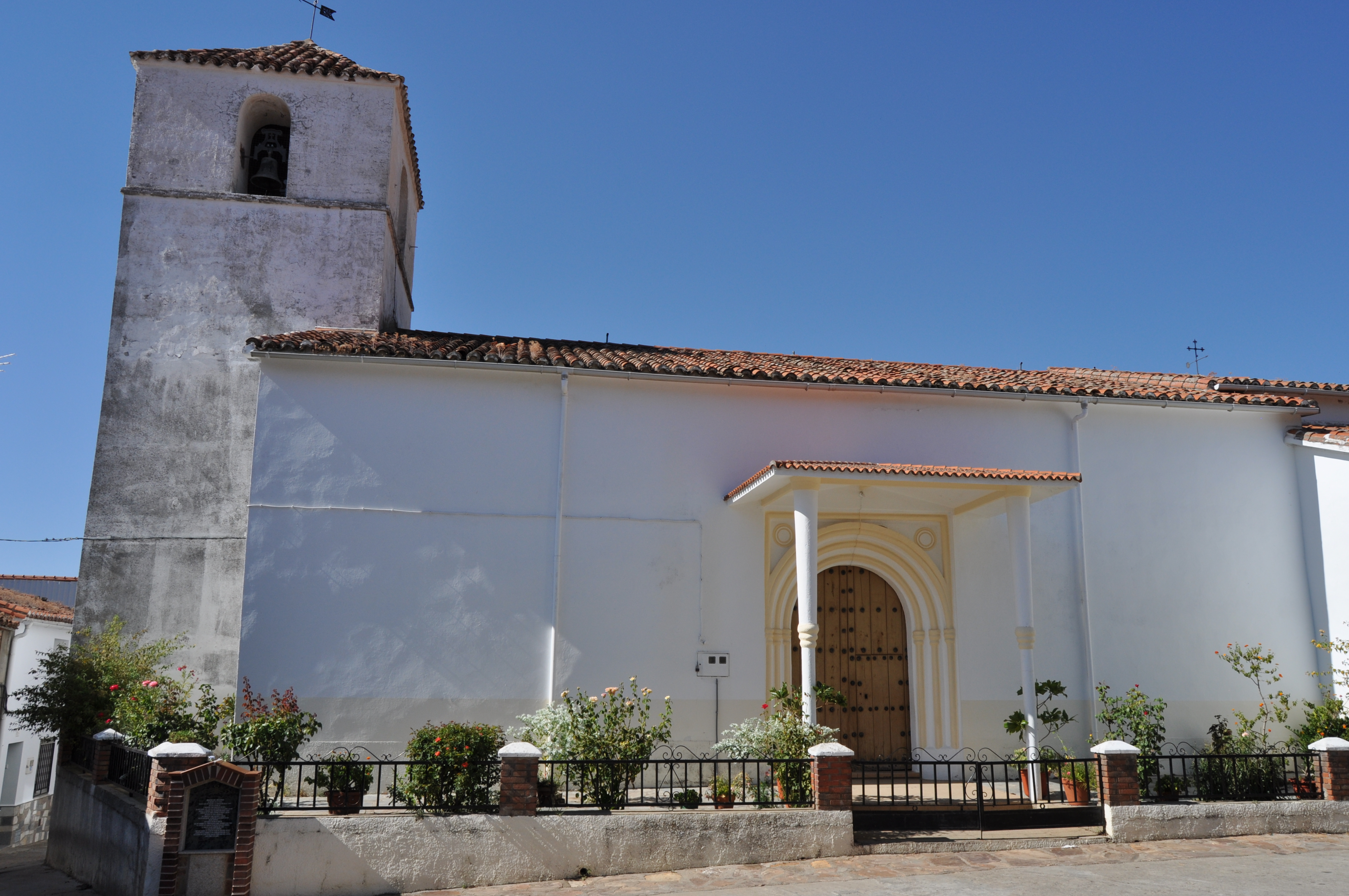 Navalvilla de Ibor - 002